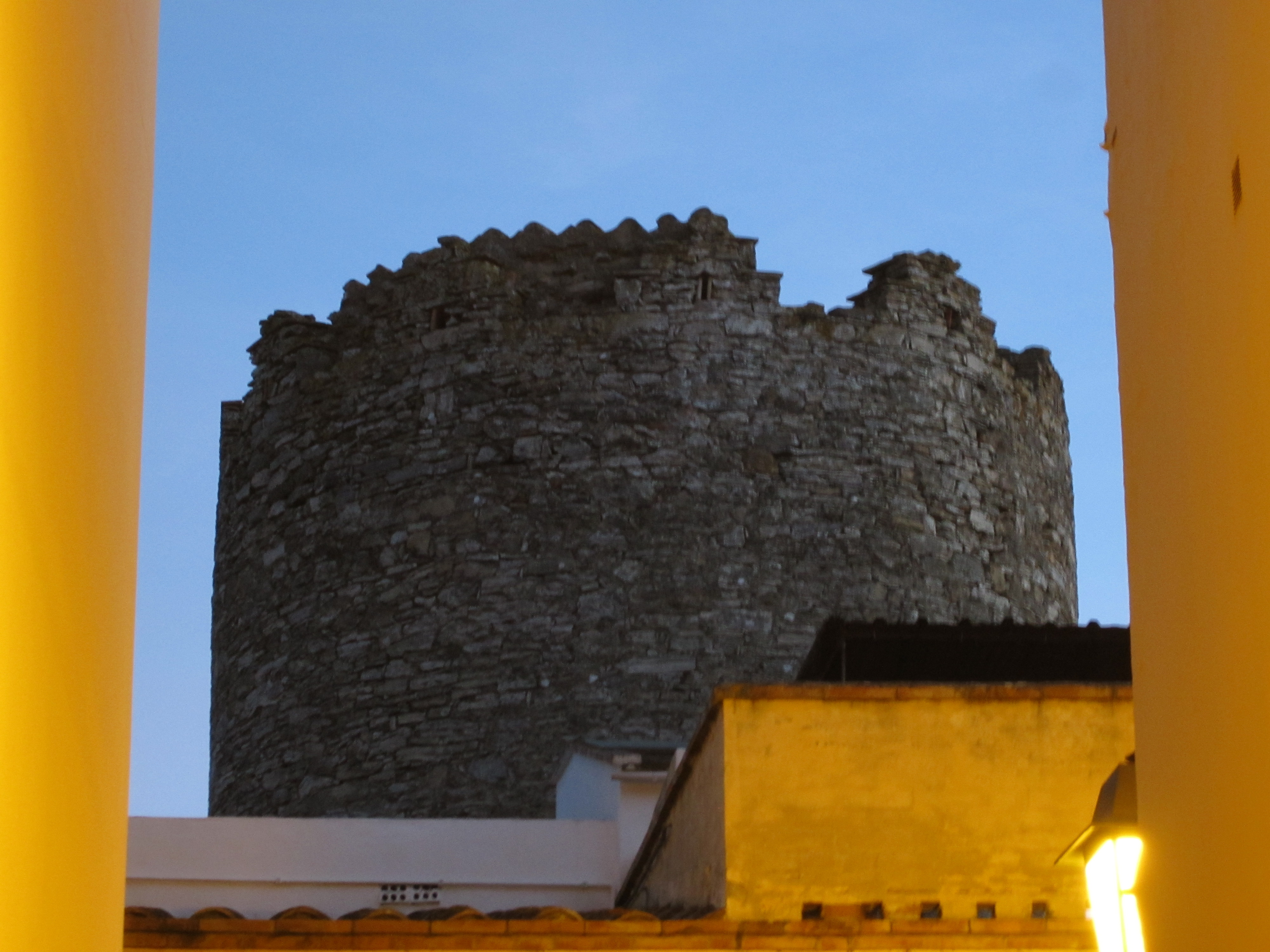 Torres de la vila: Torre de Ca n'Armanac (Begur)